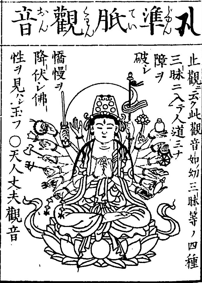 准胝観音。仏像図彙 (1783年)より。